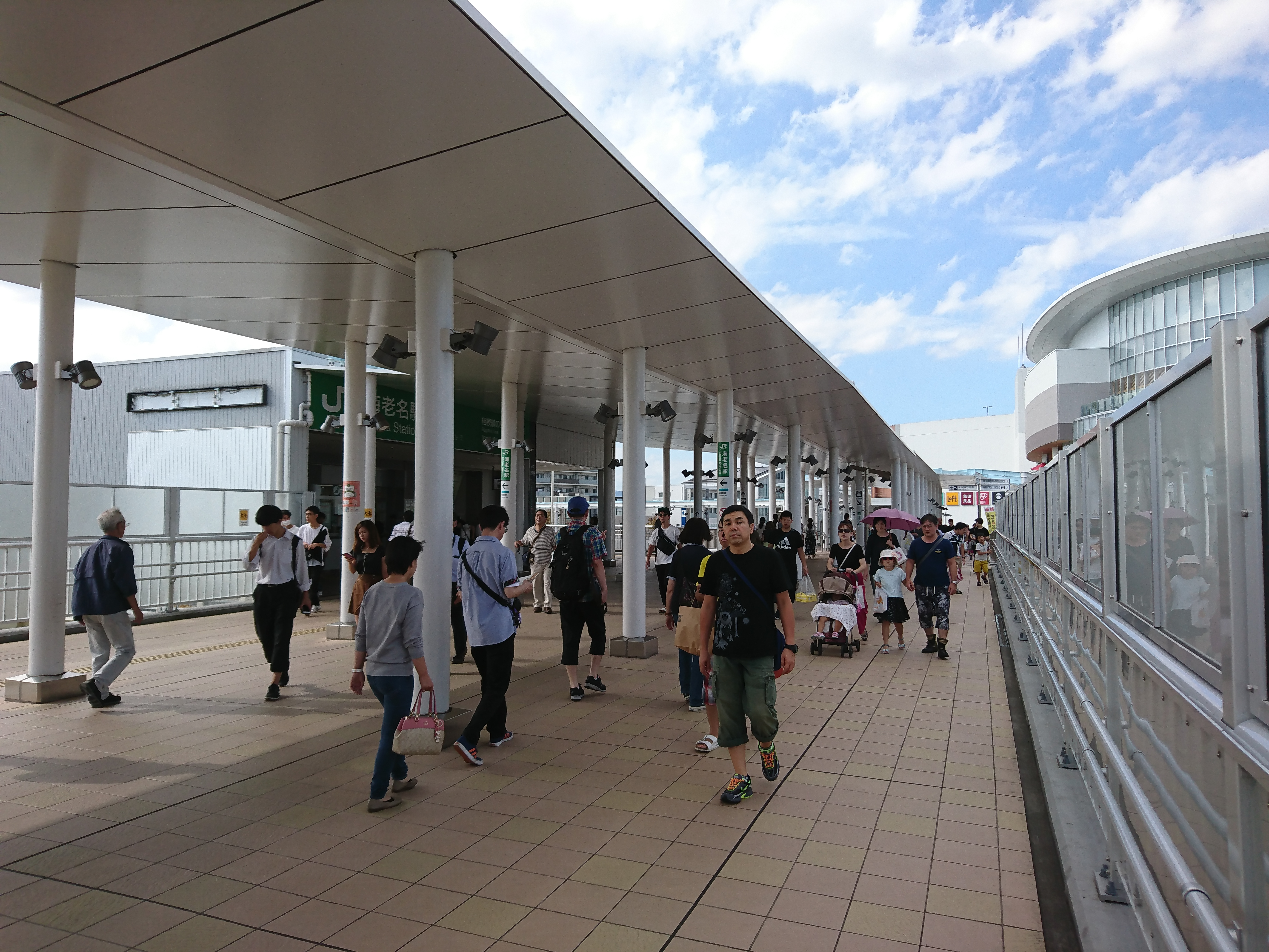 改札口周辺